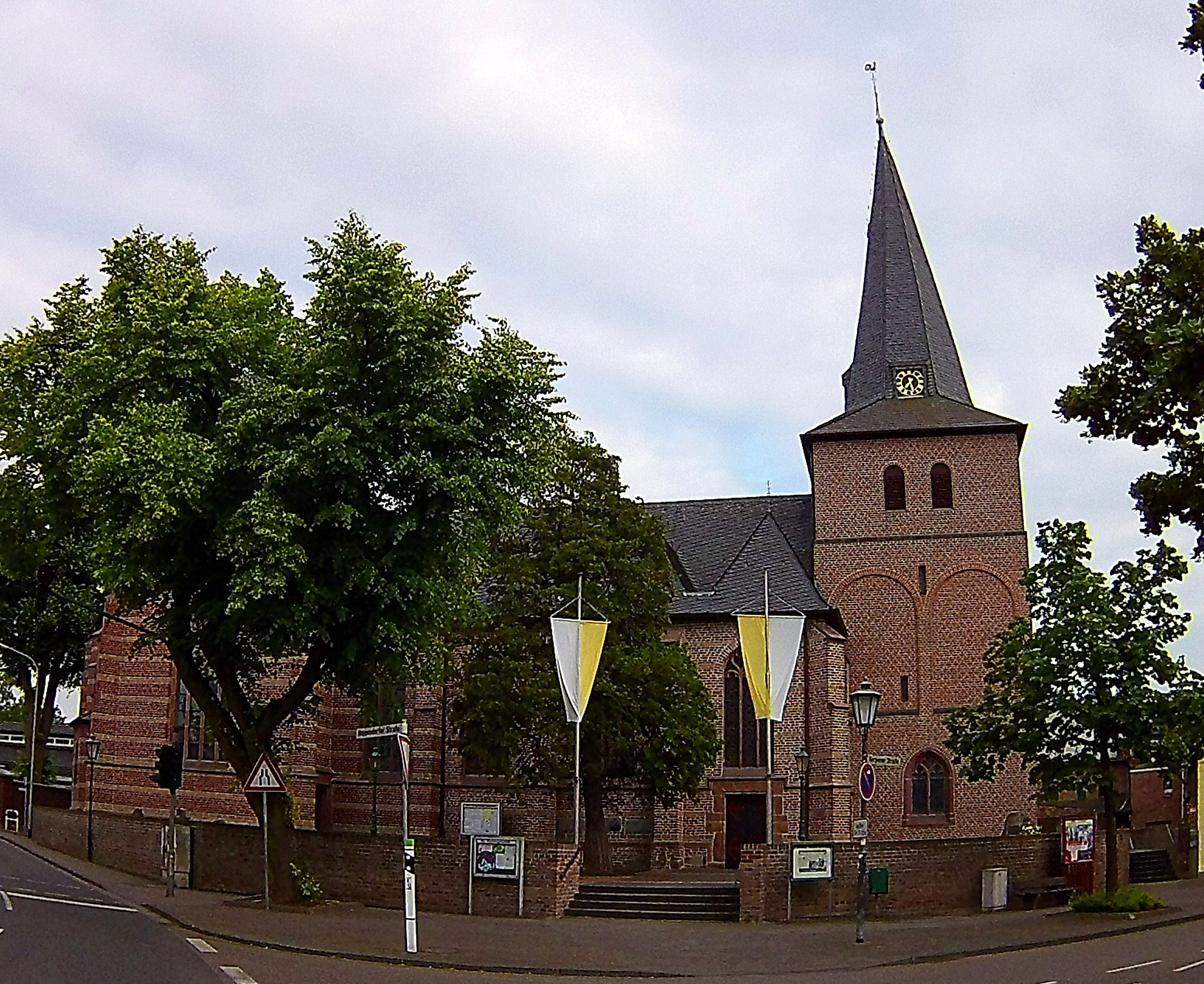 Katholische Kirche St. Michael Aussen (Nordseite)